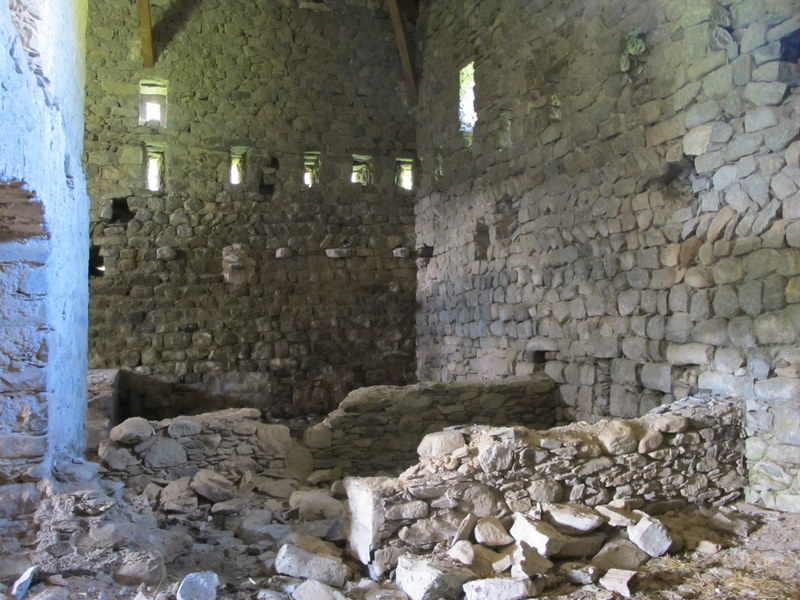 fortalesa La Sala a Vilallonga de Ter a la Comarca del Ripollès - Catalunya